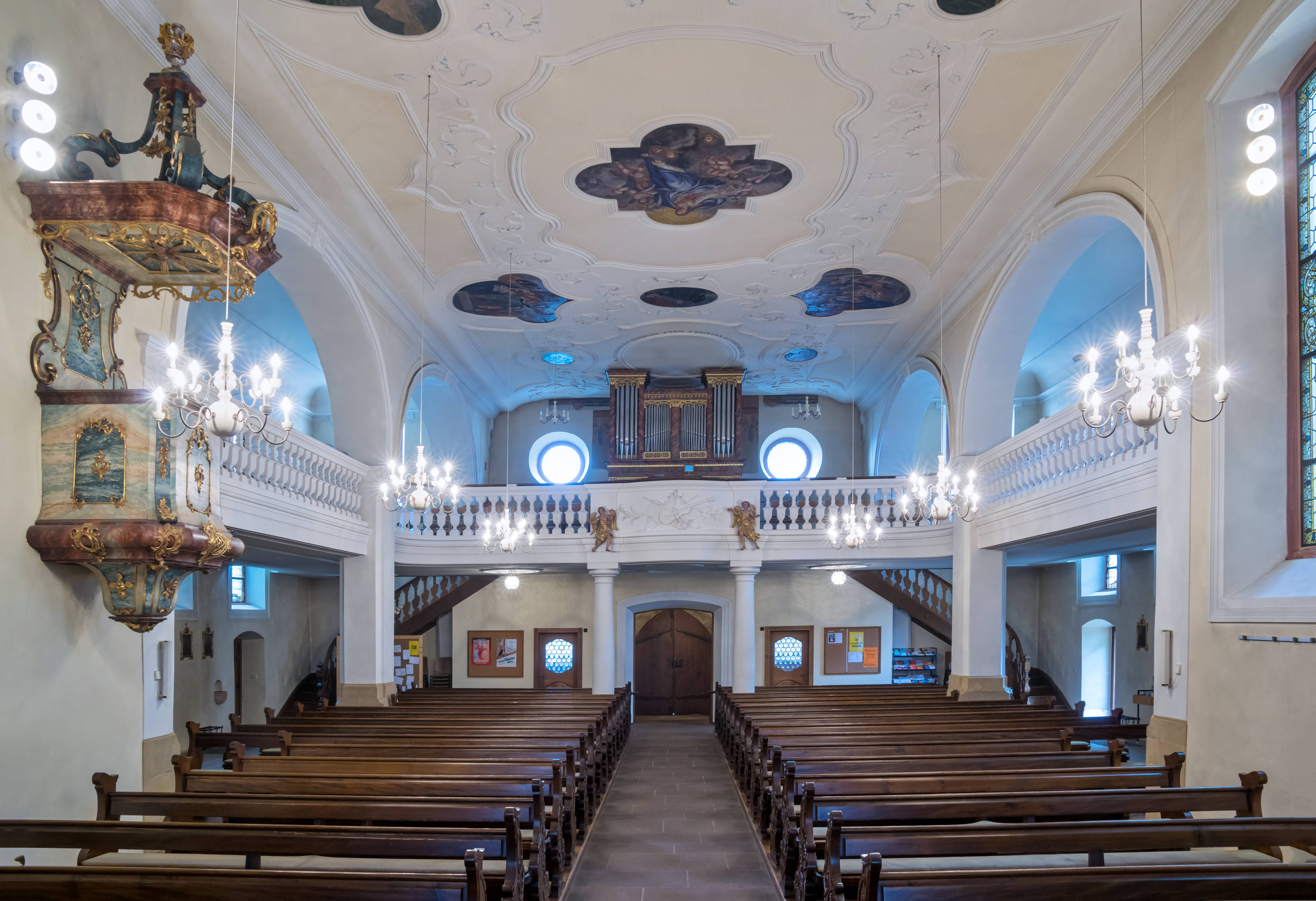 Bilder von St. Gallus und Otmar in Ebringen Blick vom Altar zum Haupteingang